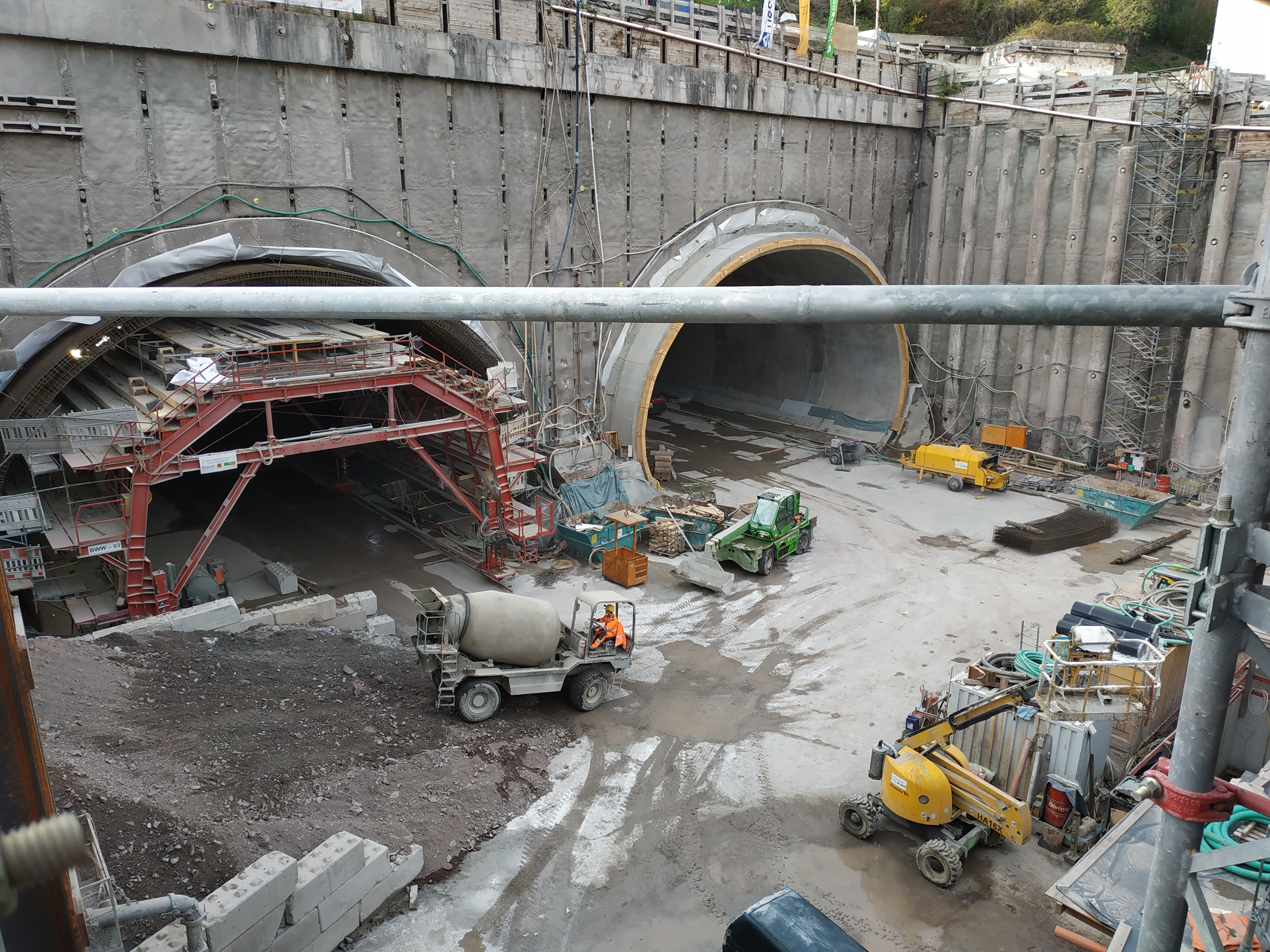 Travaux dans le cadre du projet Stuttgart 21